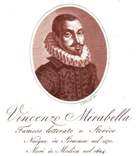 Ritratto di Vincenzo Mirabella dalla Biografia degli uomini illustri della Sicilia di Giuseppe Emanuele Ortolani Napoli 1817